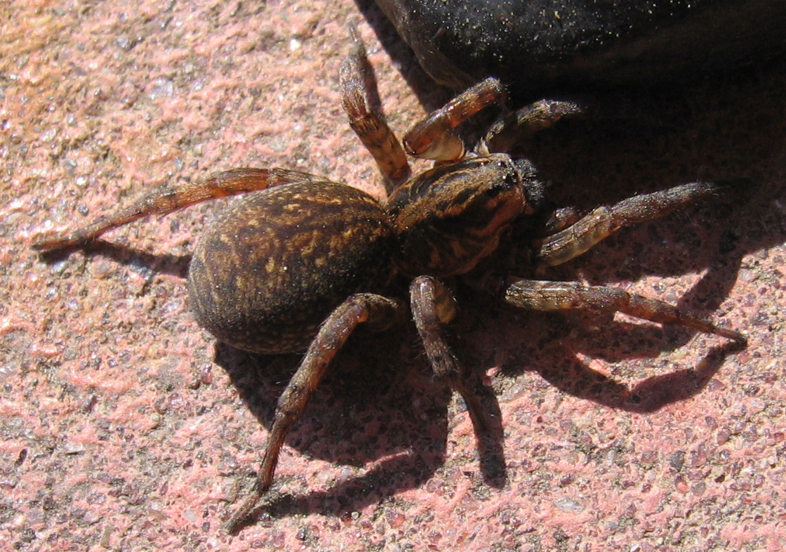 Trochosa terricola (Krzeczek naziemnik), fotografia wykonana w Małopolsce (Poland) w najbliższym otoczeniu domu. Wielkość (size): ok. 1.5—2.0 cm z nogami (with legs).